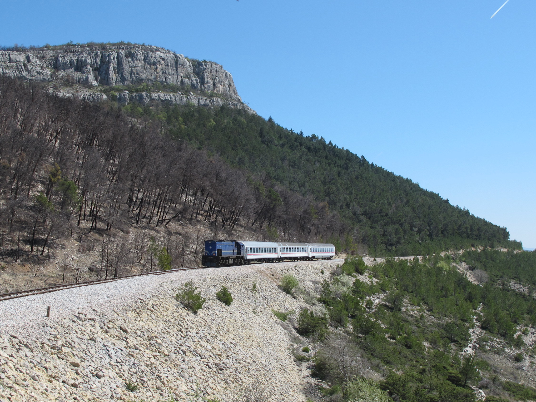 Zug mit HŽ 2044 030 zwischen Đevrske und Dalmatinska Ostrovica